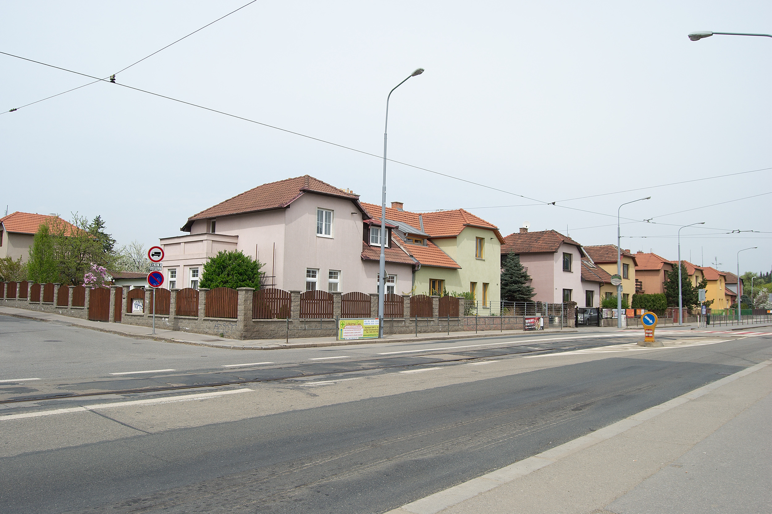 Brno-Černá Pole - domy na západní straně Merhautovy ulice, patřící ke Štefánikově čtvrti